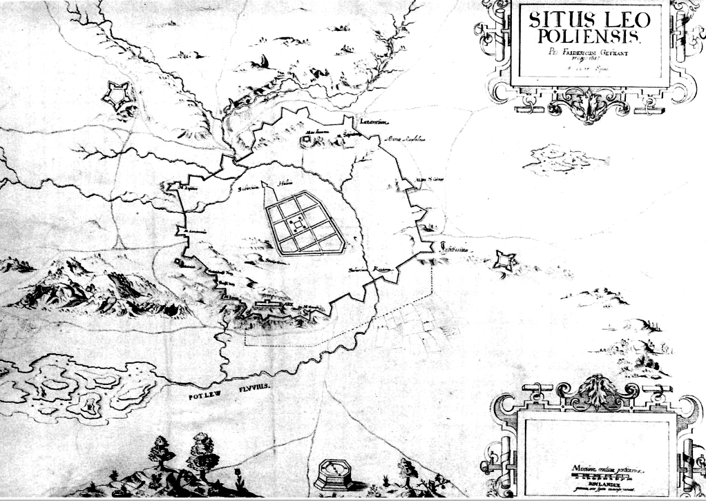 План фортифікацій львівських передмість (1634-1635) Фридерика Ґетканта.